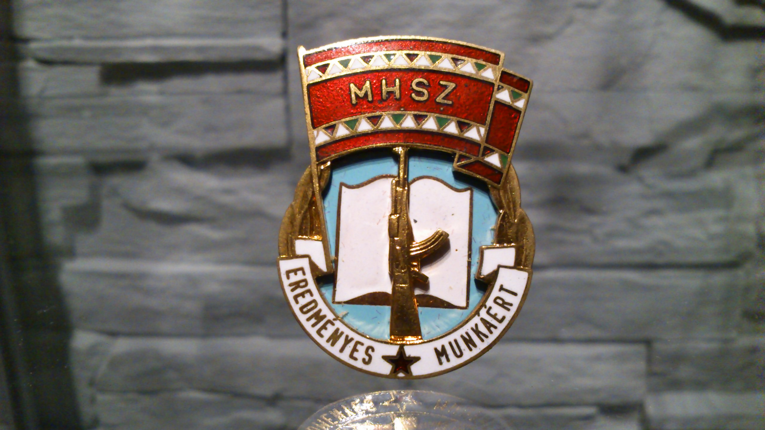 Własność - Muzeum Miniaturowej Sztuki Profesjonalnej Henryk Jan Dominiak ul. Żwakowska 8 m 66 43-100 Tychy - MHSZ EREDMÉNYES MUNKÁÉRT.